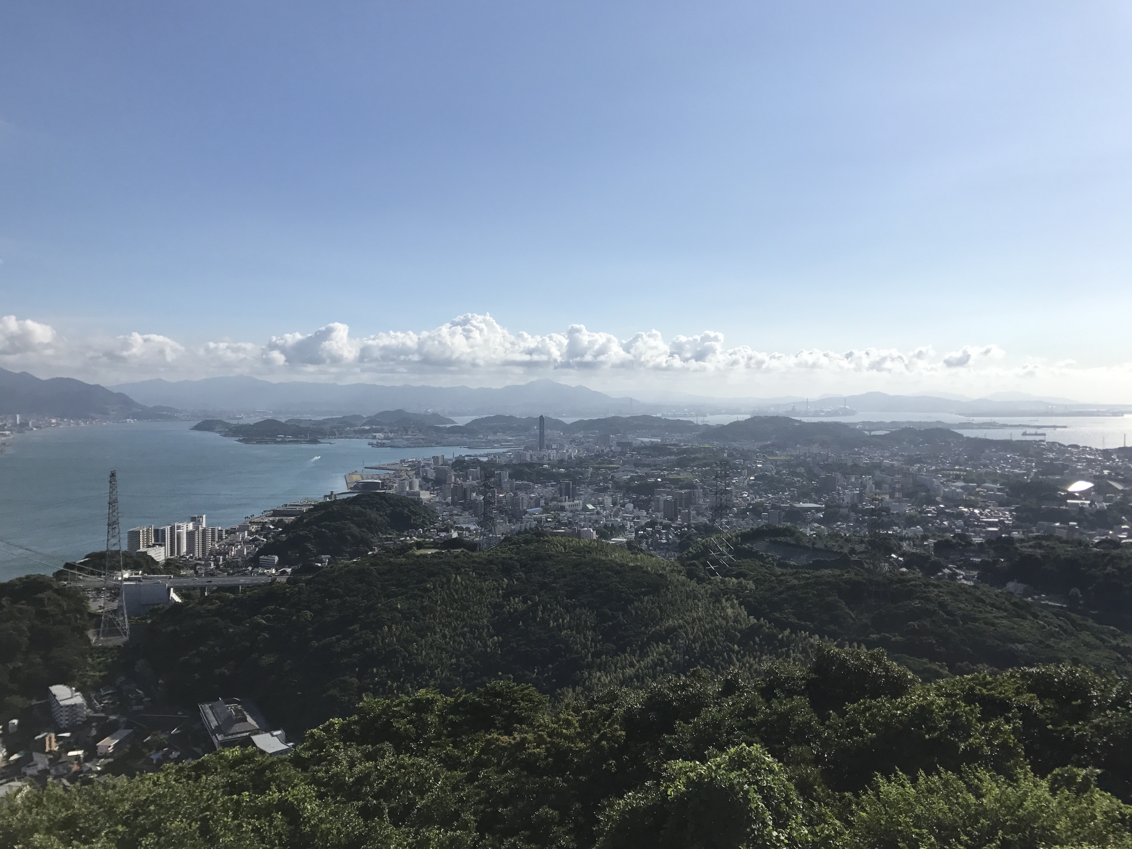 火の山ロープウェイ・火の山駅より望む彦島方面